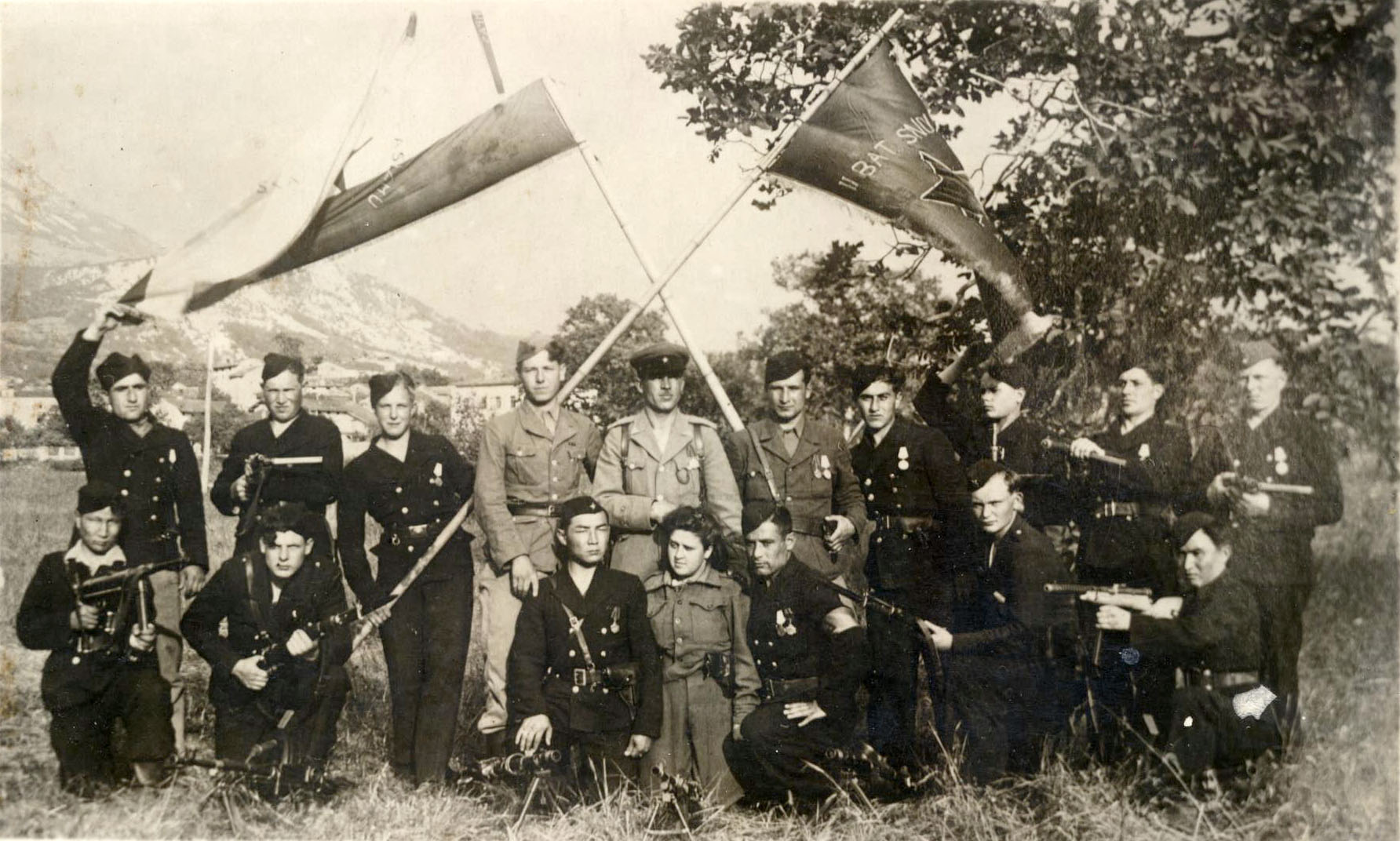 Skupina borcev 2. ruskega bataljona Bazoviške brigade s komandatom Anatolijem Djačenkom